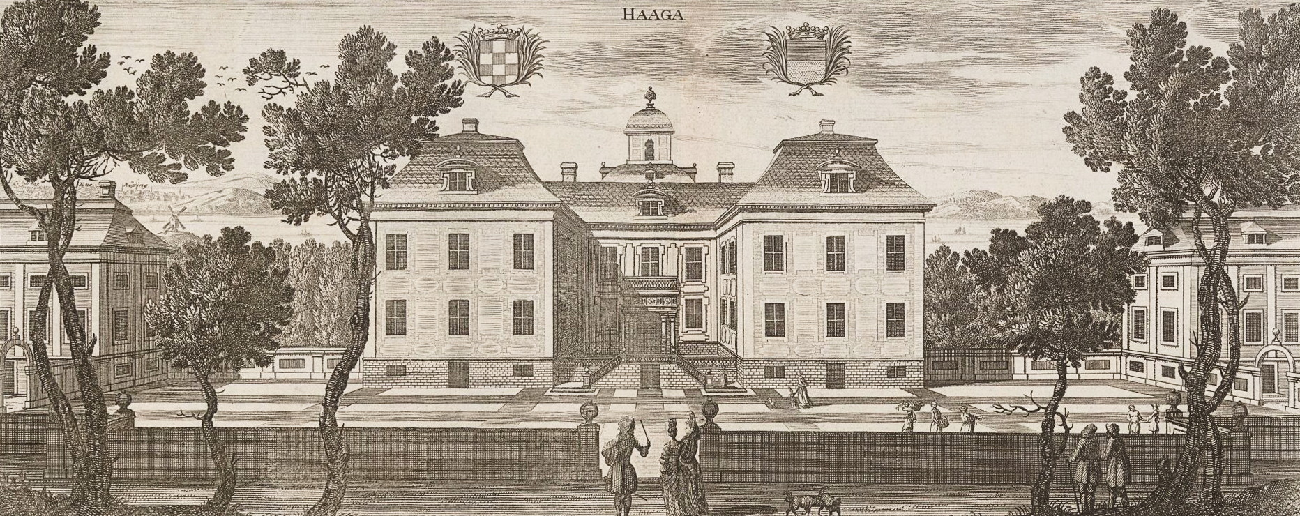 Haga slott enligt Erik Dahlbergs illustration i Sueciaverket